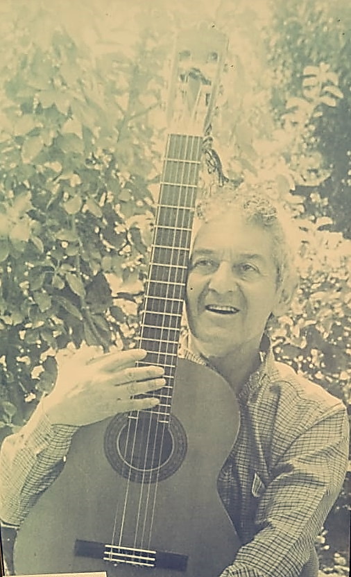 Fotografía del Folclorista Amador Cárdenas